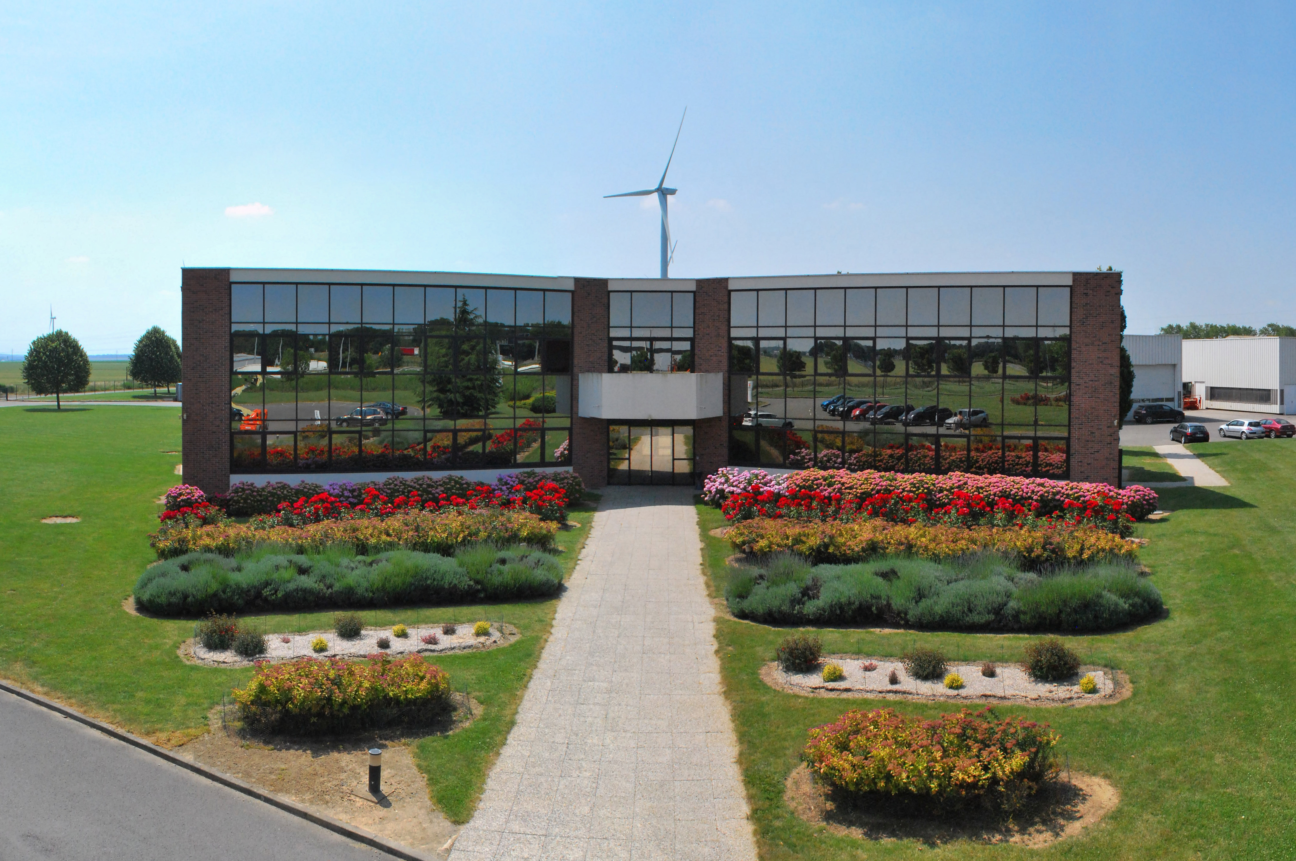 KWS France S.A.R.L in Roye, Frankreich